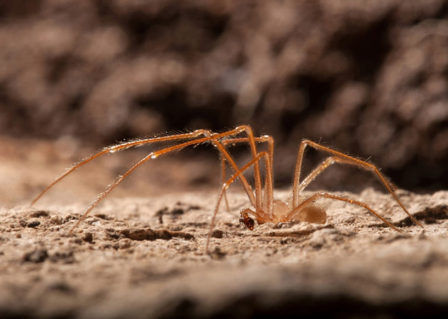 Kryptonesticus deelemanae Male, body length 3.6 mm.